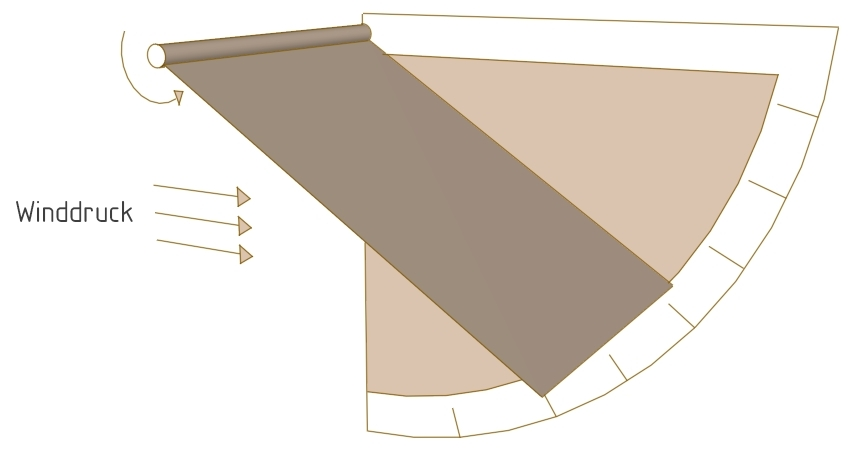 Windplatte